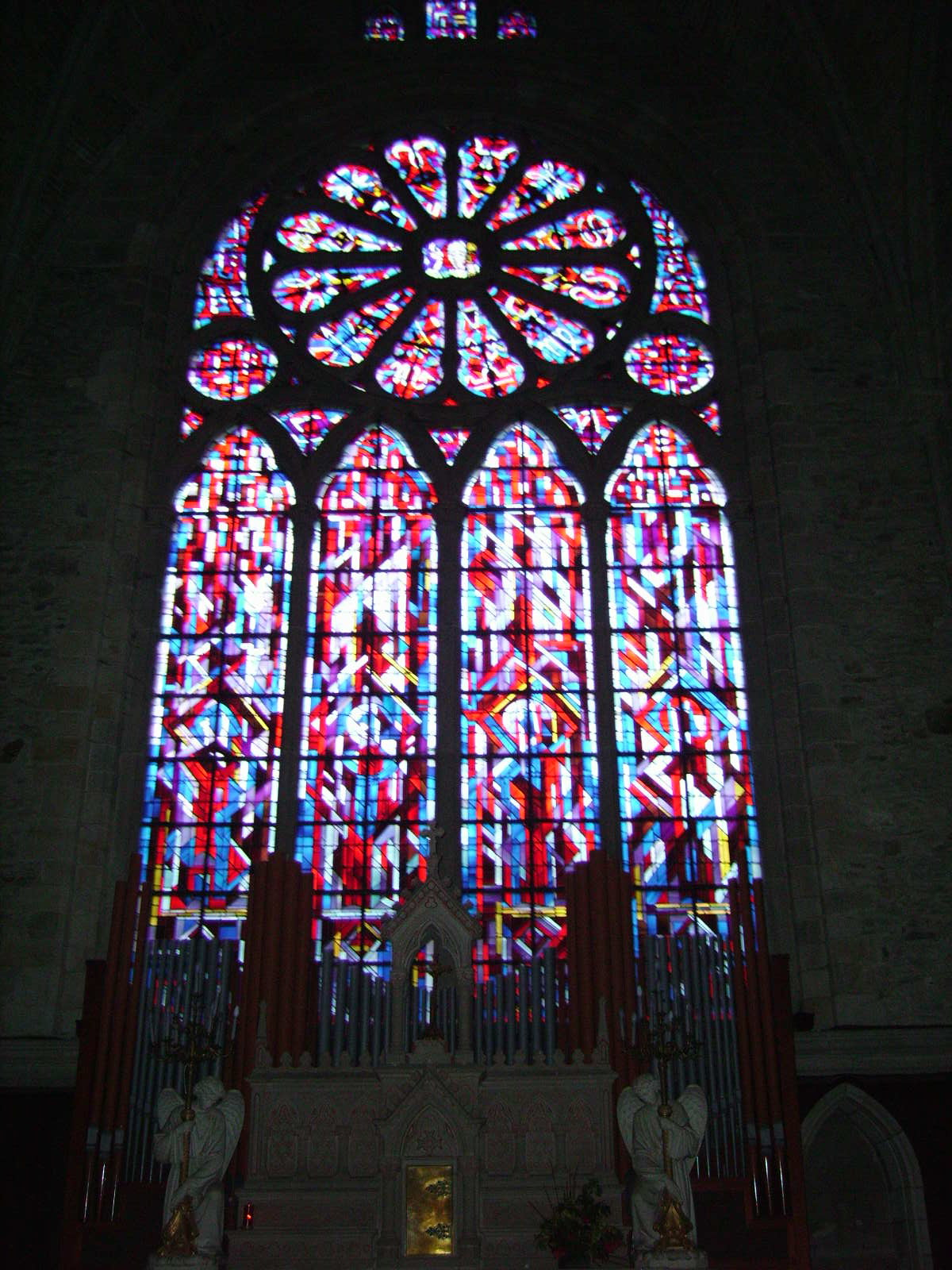 Vitraĵo de la preĝejo de Léhon